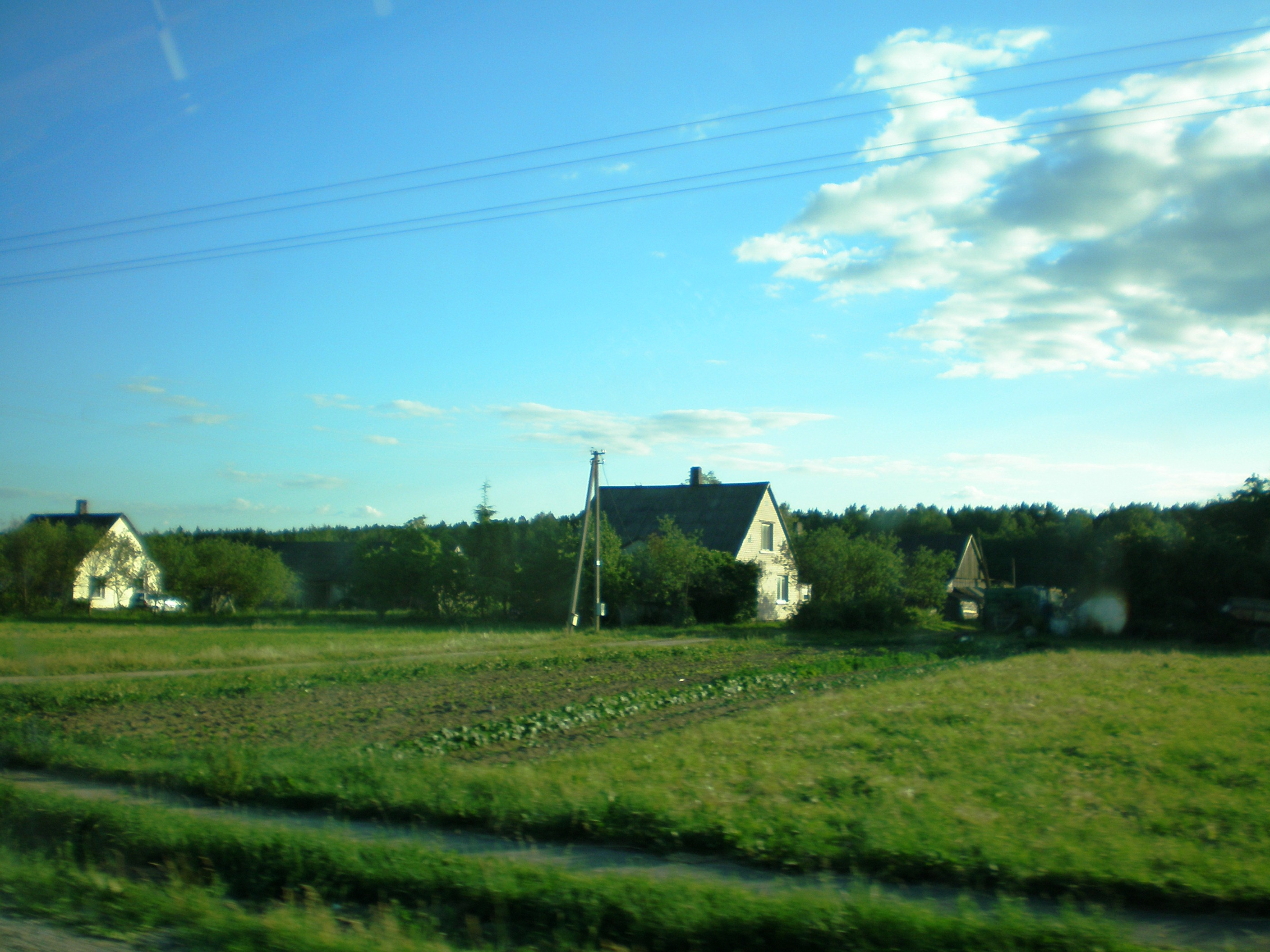 Mieliūnai, Biržų raj.